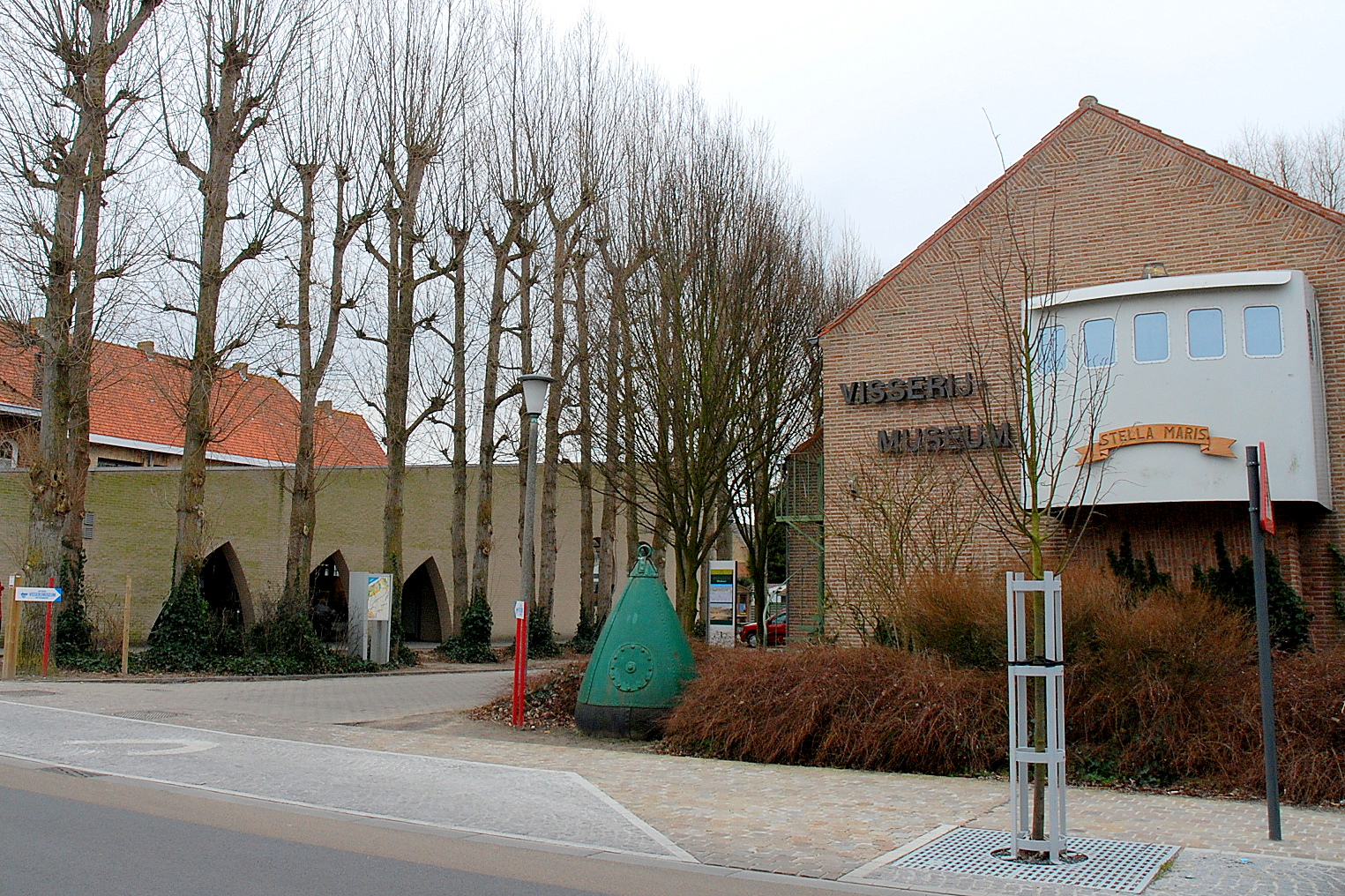 het Nationaal Visserijmuseum te Oostduinkerke (België)